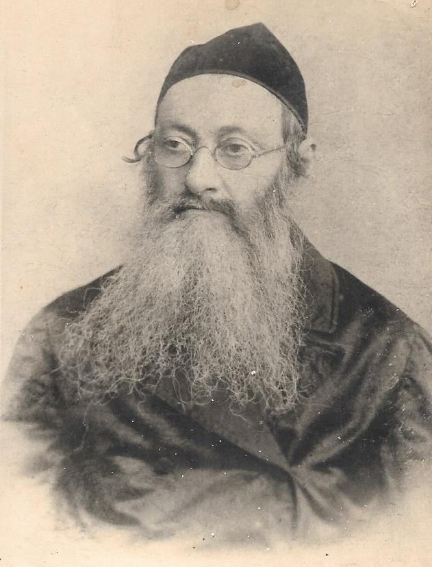 סבא רבא של מריאנסקי הרב הגאון ניסן ברוידא הרב הציוני הראשון ממיסדי חובבי ציון ומראשוני תנועתסבא רבא של מריאנסקי הרב הגאון ניסן ברוידא הרב הציוני הראשון ממיסדי חובבי ציון ומראשוני תנועת המזרחי 1890. במוה"ר שמשון מעיר קרליץ (עיירה), היה אבד"ק שינאווקע ואח"כ אבד"ק קרעווע ומאוחר יותר אבד"ק הוראדאק נפטר בשנת תרס"ד י"ב ניסן. חיבר ספר "חדושי הר"ן" על הלכות ודרושים.